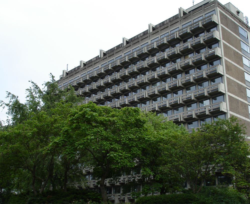 MPI in Mülheim an der Ruhr - Neubau